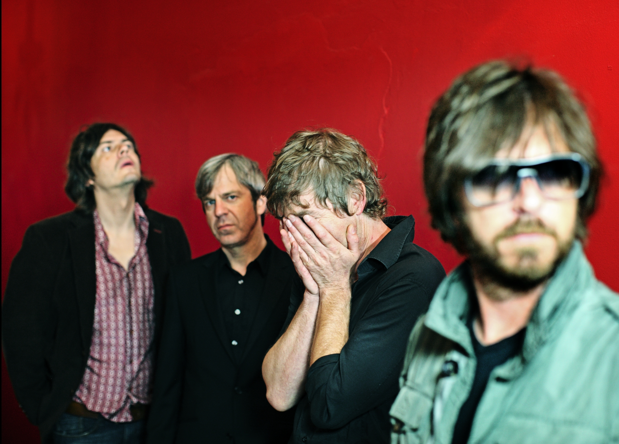 Pressefotos aus dem Jahr 2012